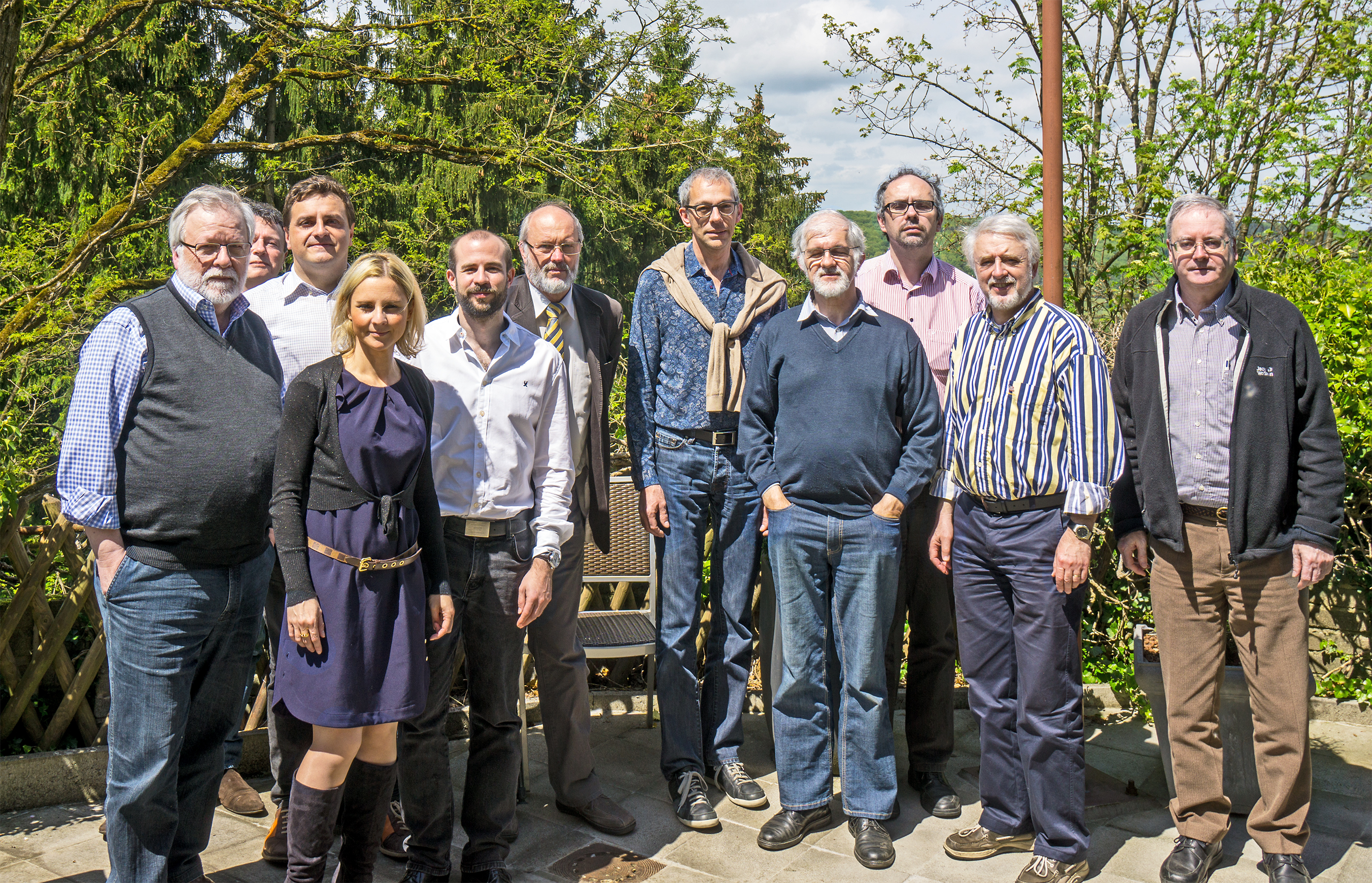 Wiki-Treffen am Juegdschlass, de 9. Mee 2015